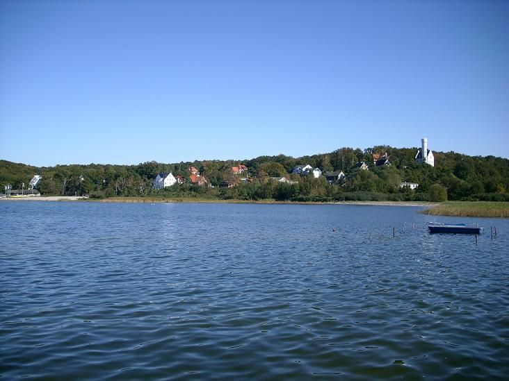 Blick über den Ort Lietzow von der Schleuse am Großen Jasmunder Bodden aus gesehen.